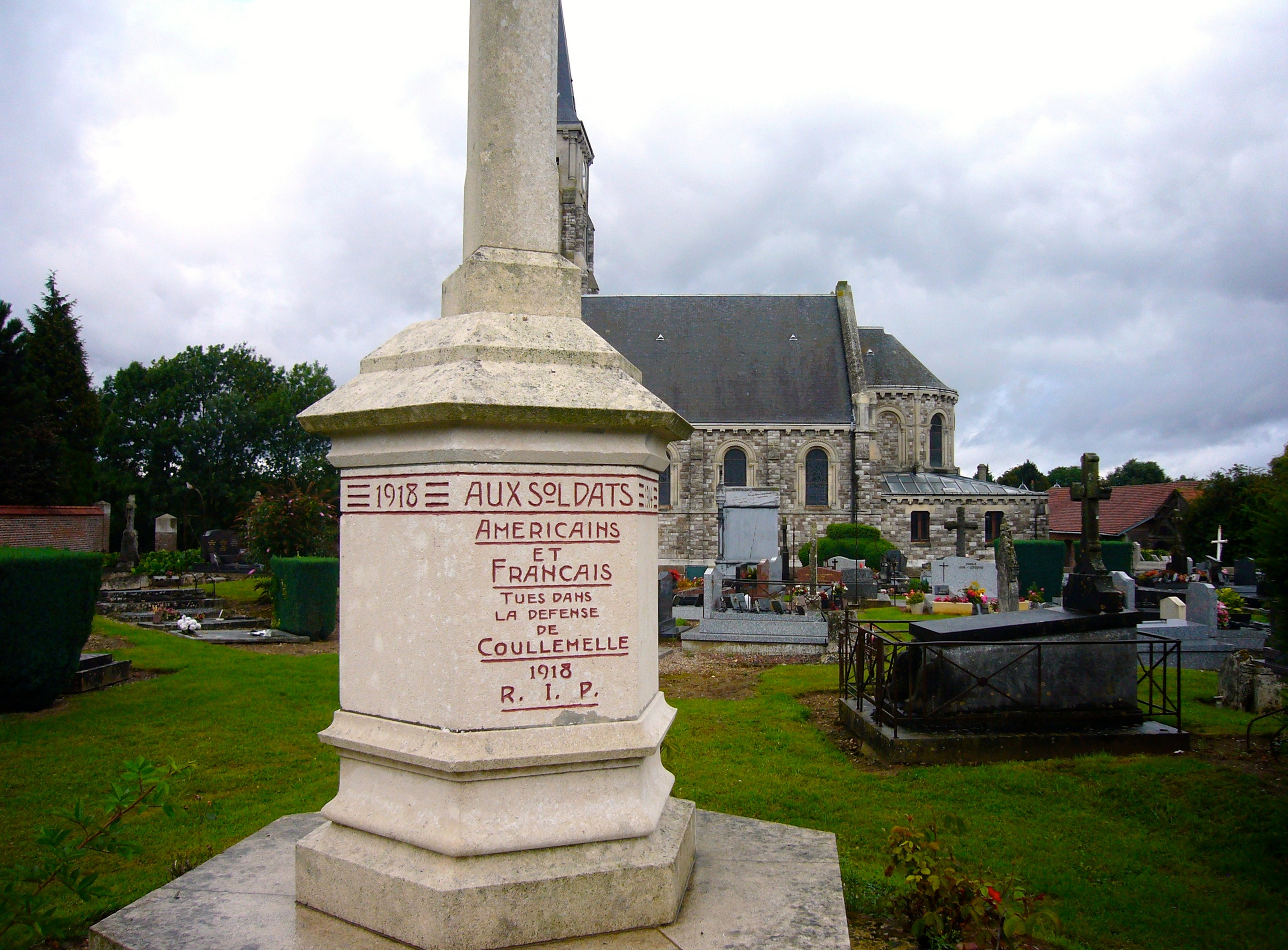 Monument commémoratif de la Première Guerre Mondiale à Coullemelle (Somme)